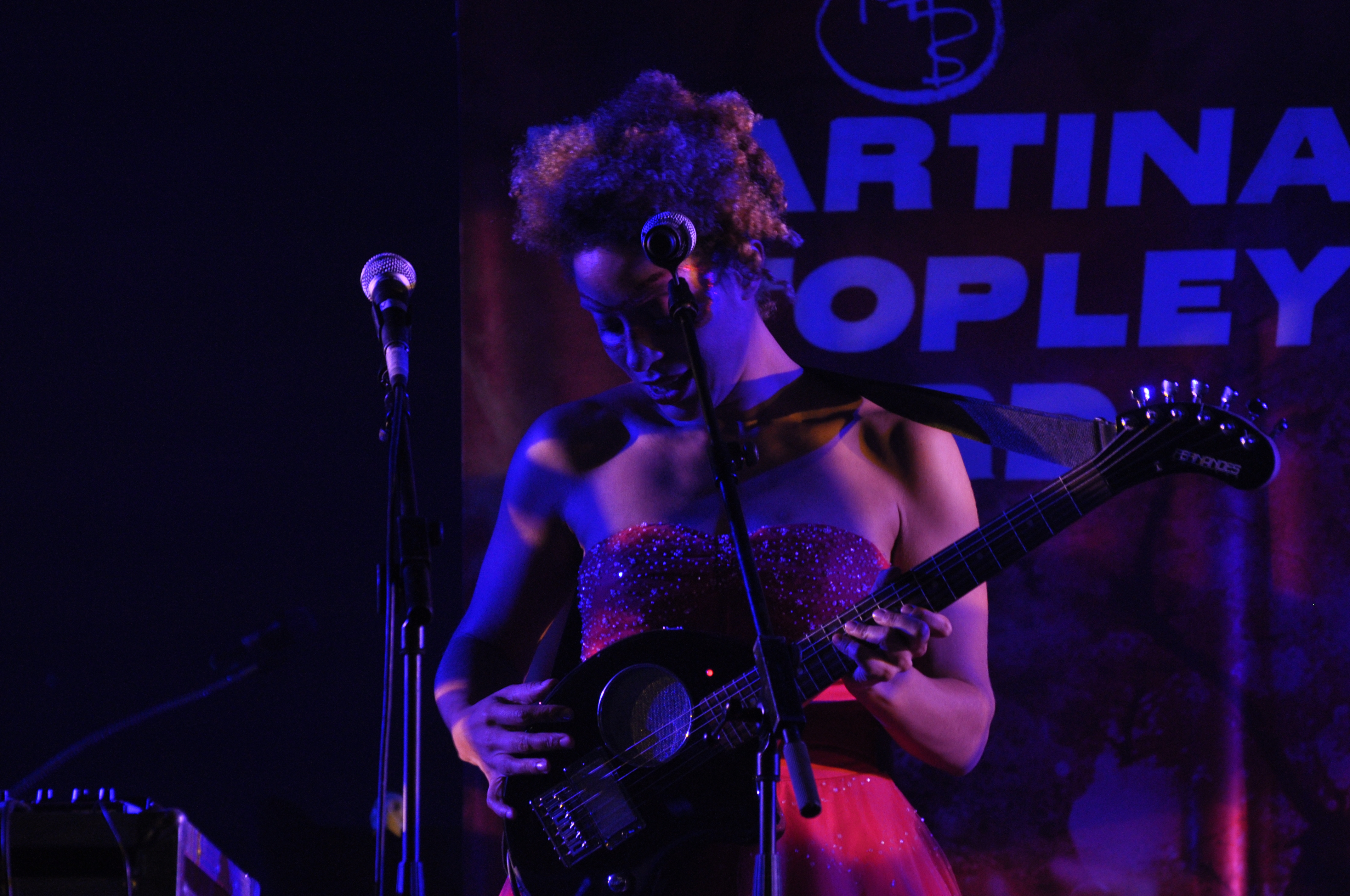 Massive Attack in Conegliano on 08/11/2009.